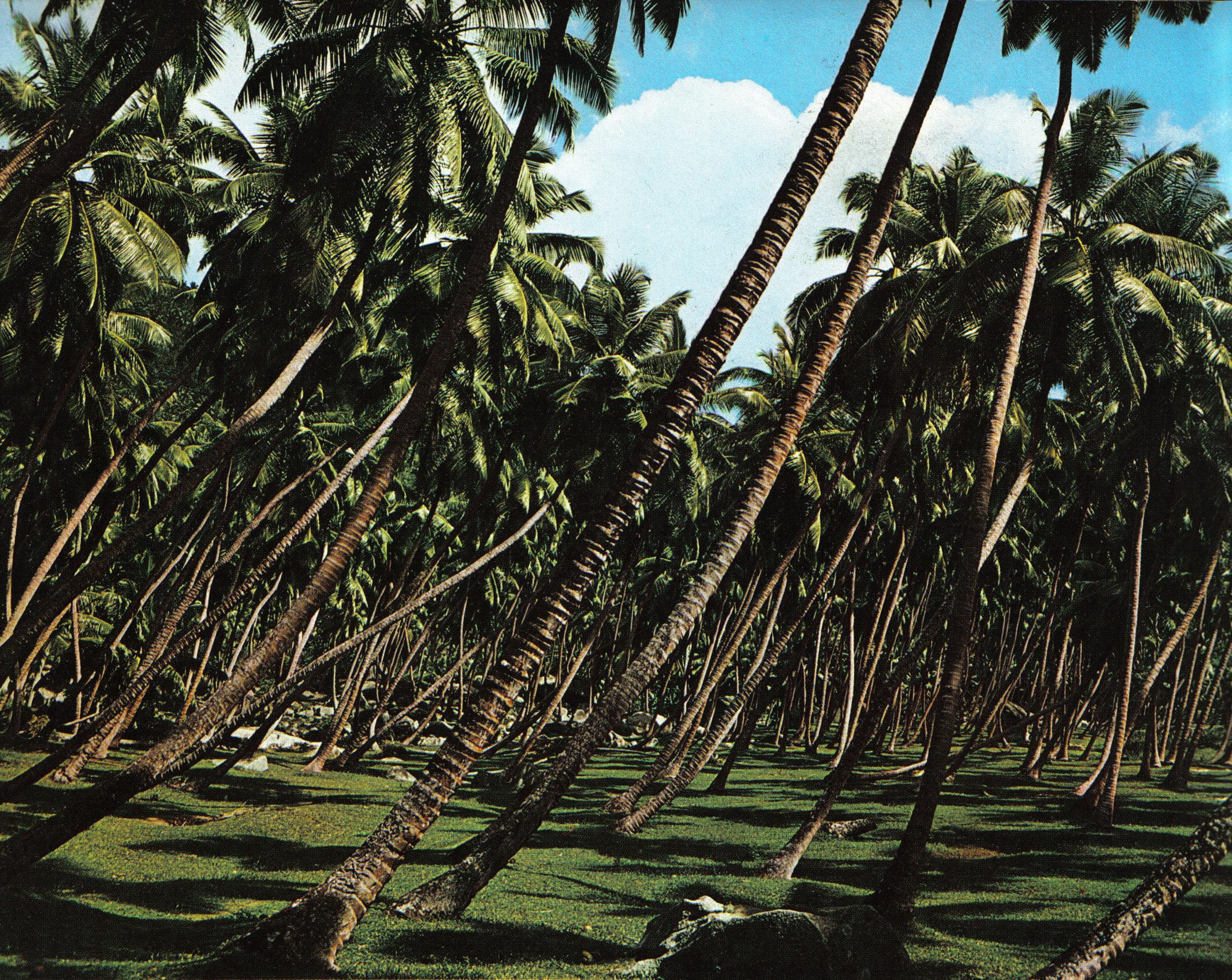 A coconut plantation at Anse Coco, La Digue, Seychelles